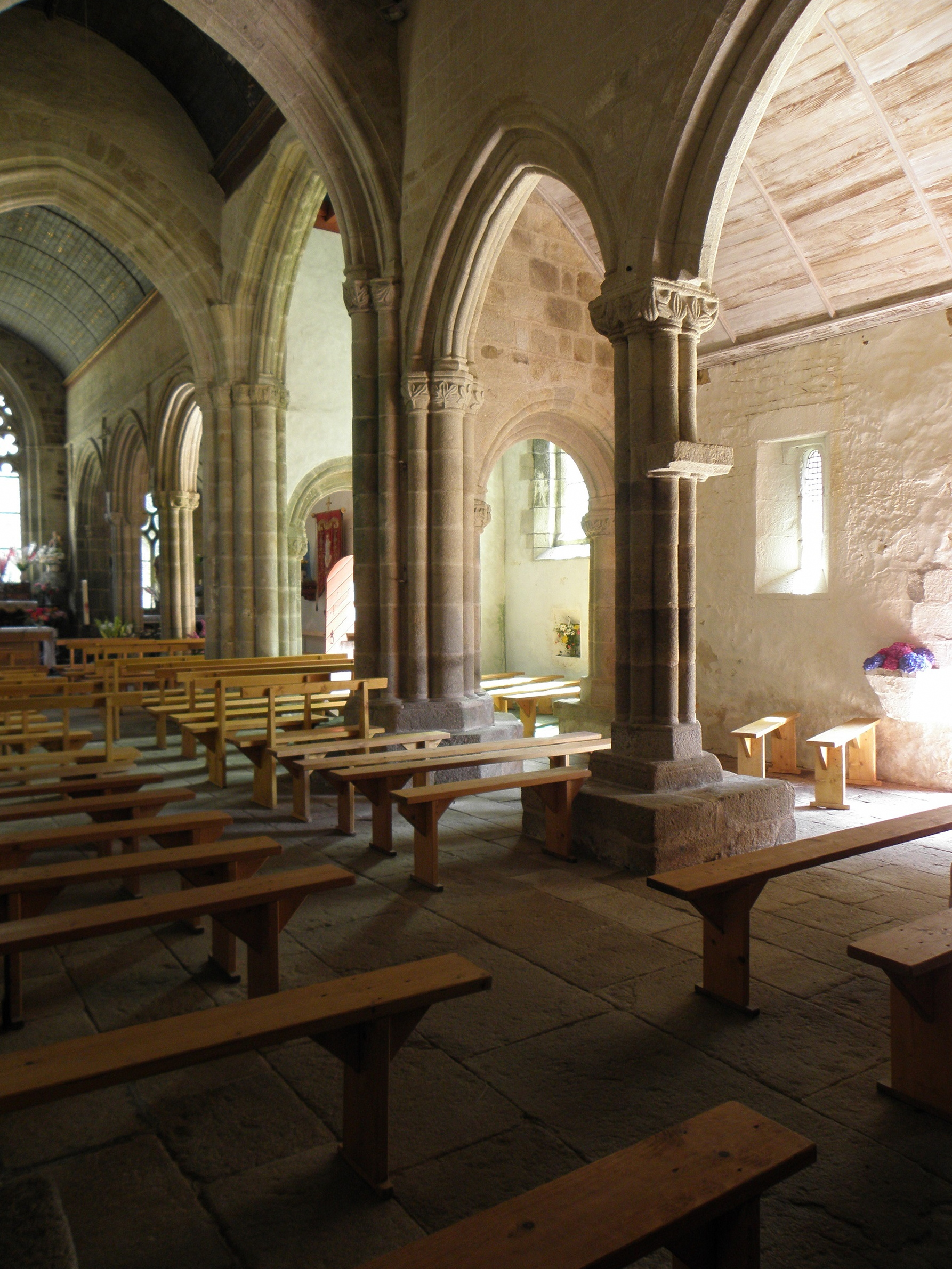 Chapelle Notre-Dame-de-Kérinec en Poullan-sur-Mer (29). Arcatures sud de la nef et du chœur.